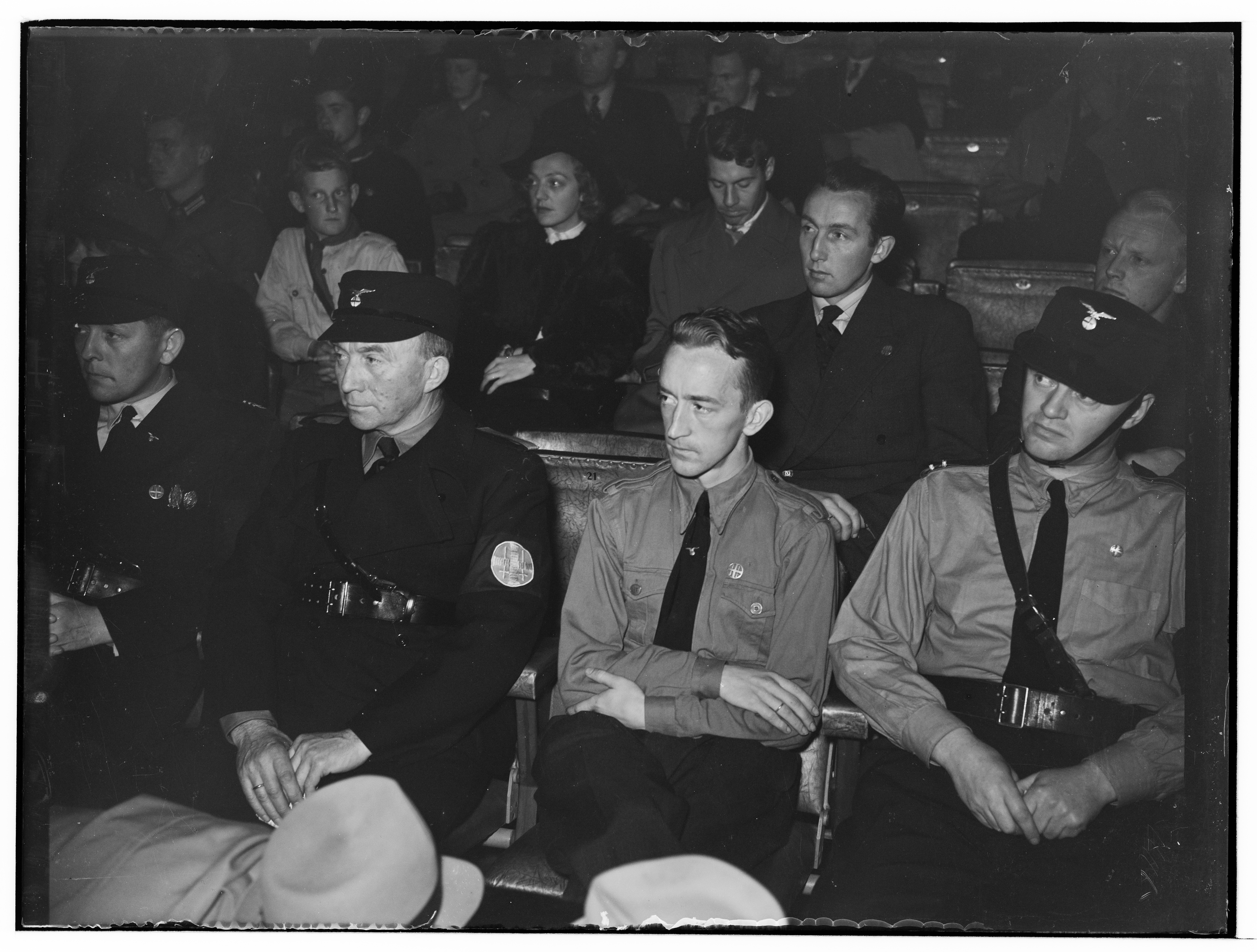 «Nasjonal Samling. Møte i “Saga”. 1940-10-03» Ifølge NTB-reportasjer i Aftenposten 4. oktober 1940 holdt Nasjonal Samling to viktige møter i Oslo sentrum kvelden før (torsdag 3. oktober 1940): Det ene foregikk i Klingenberg kino der NS-fører Vidkun Qusiling talte «for overfylt hus og et ytterst forventingsfullt publikum av alle befolkningslag» om at «våre tiltak er diktert av nasjonale hensyn» («Det er ikke noget diktatur vi vil. Det nye er at samfundet bygges op på samarbeid i næringsliv og yrke. Sammenfattet i et riksting og et kulturting»). Det andre, kongruente møtet foregikk i Saga kino der «konstituert statsråd NS-propagandachef» Gulbrand Lunde var hovedtaler og sa blant annet at «en nasjonal og sterk regjering uavhengig av partikrangel og klassekamp er det eneste som kan redde Norge». På bildet sees blant andre Konrad Sundlo (i hirduniform med mørk jakke og lue), Rolf Holm (i skjorte, uten lue) og Bjarne Holst, ekspedisjonssjef i Kultur- og Folkeopplysningsdepartementet (rett bak Holm) og Willy Klevenberg (ytterst til venstre på stolraden bak)